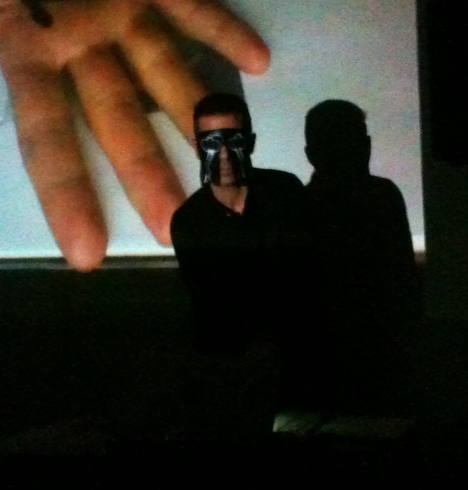 Sesión Psicográfica en Madrid (Invocando a Austin Osman Spare). 12 de diciembre a las 20.30 h. Café Molar (Calle de la Ruda 19, Madrid)